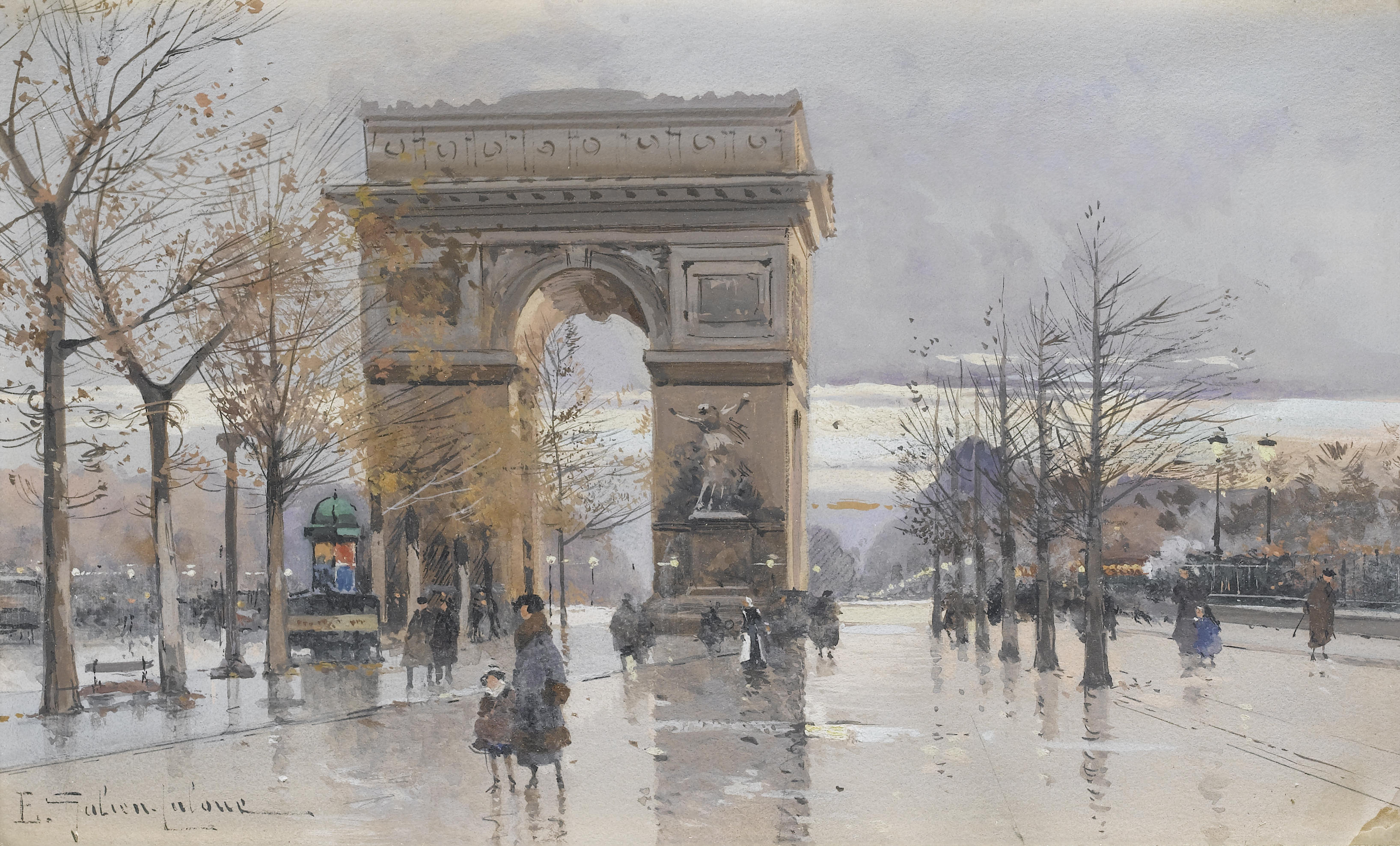 L'Arc de Triomphe, Paris.